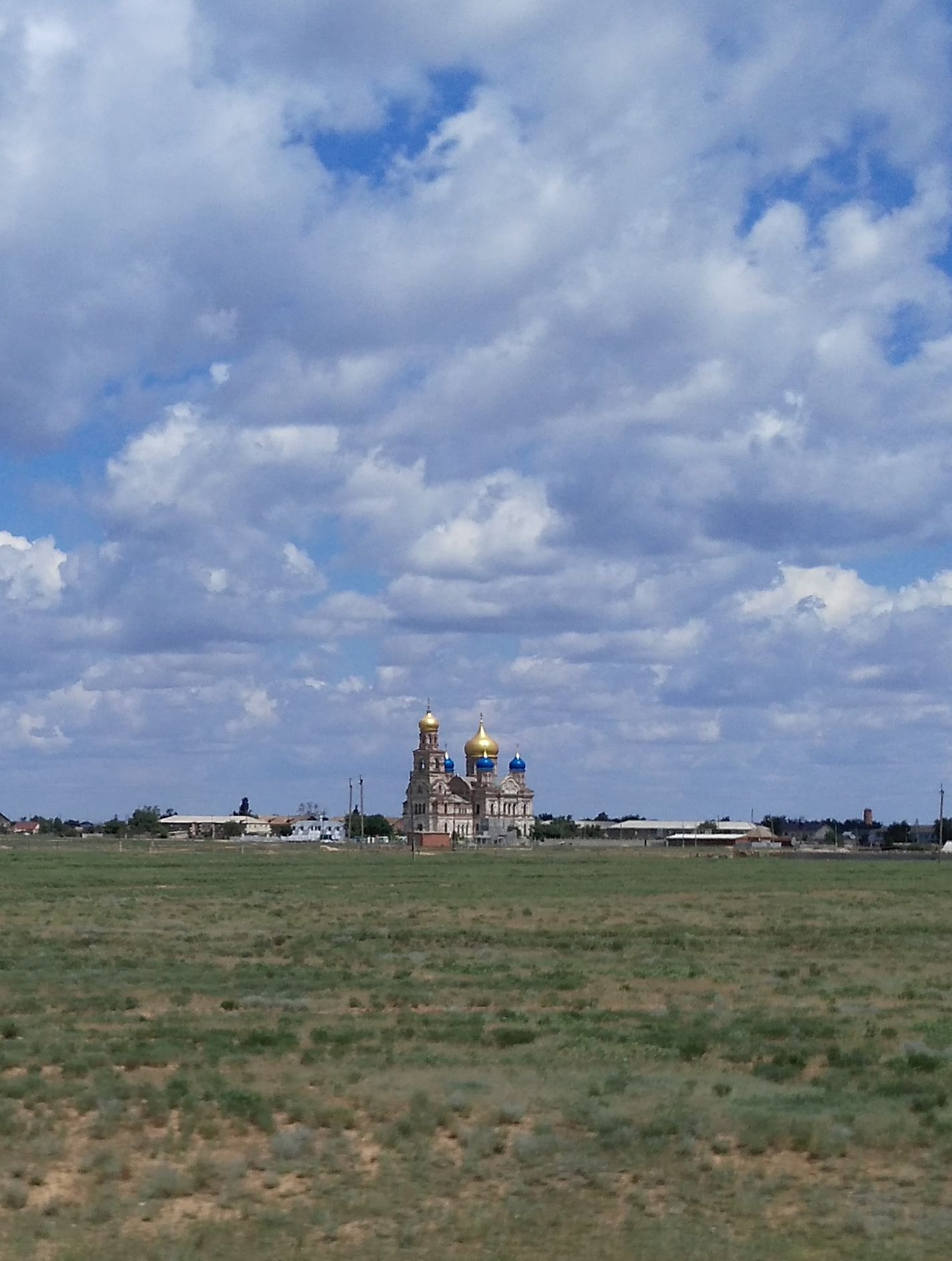 Храм Рождества Пресвятой Богородицы (Рождества-Богородицкая церковь). Село Никольское Енотаевского района Астраханской области.